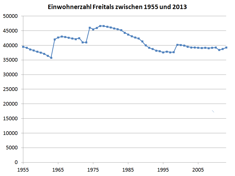 Einwohnerdiagramm Freital